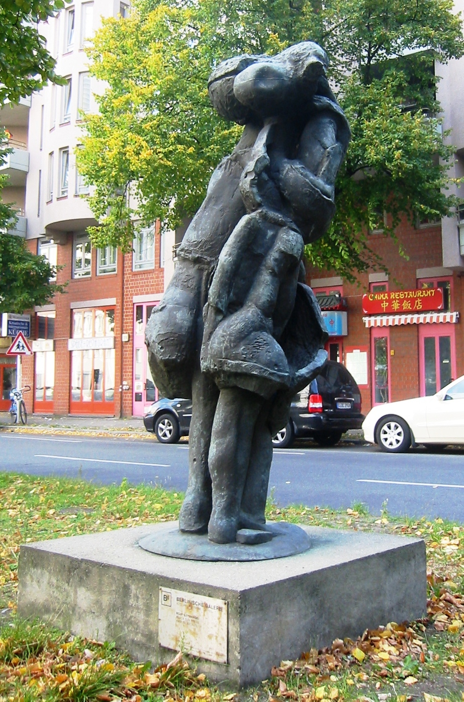 Statue "Black Sun Press" von Rolf Szymanski in der Lindenstraße in Berlin-Kreuzberg